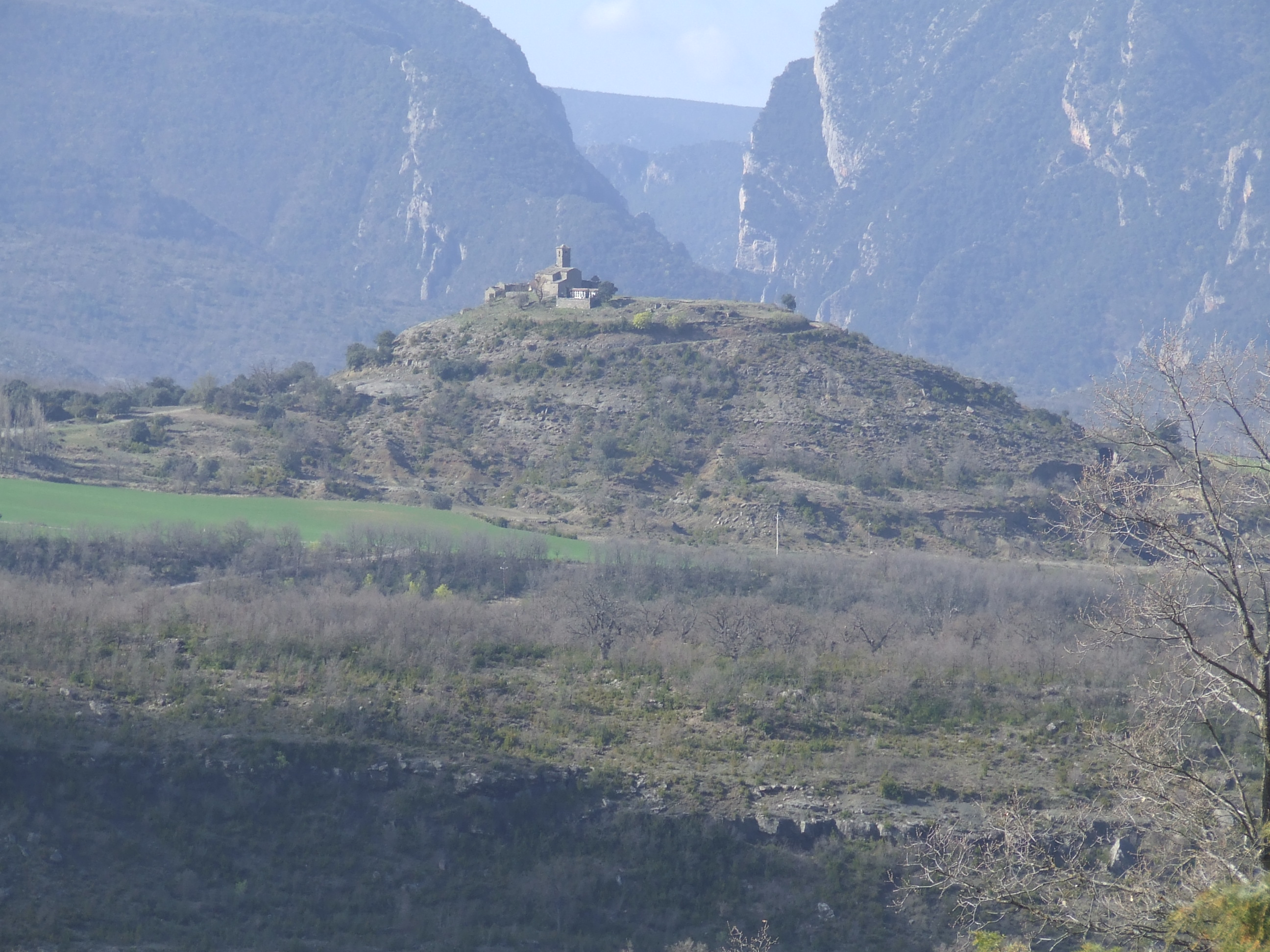 El turó on hi hagué el castell de Castissent (Fígols de Tremp, Tremp, Pallars Jussa)